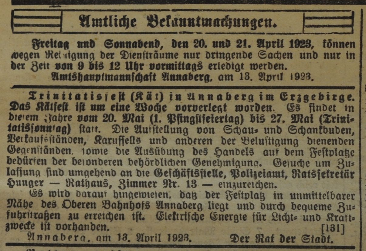 Die amtliche Bekanntmachung der Stadt Annaberg, dass die Annaberger Kät im Jahre 1923 um eine Woche vorverlegt wurde.